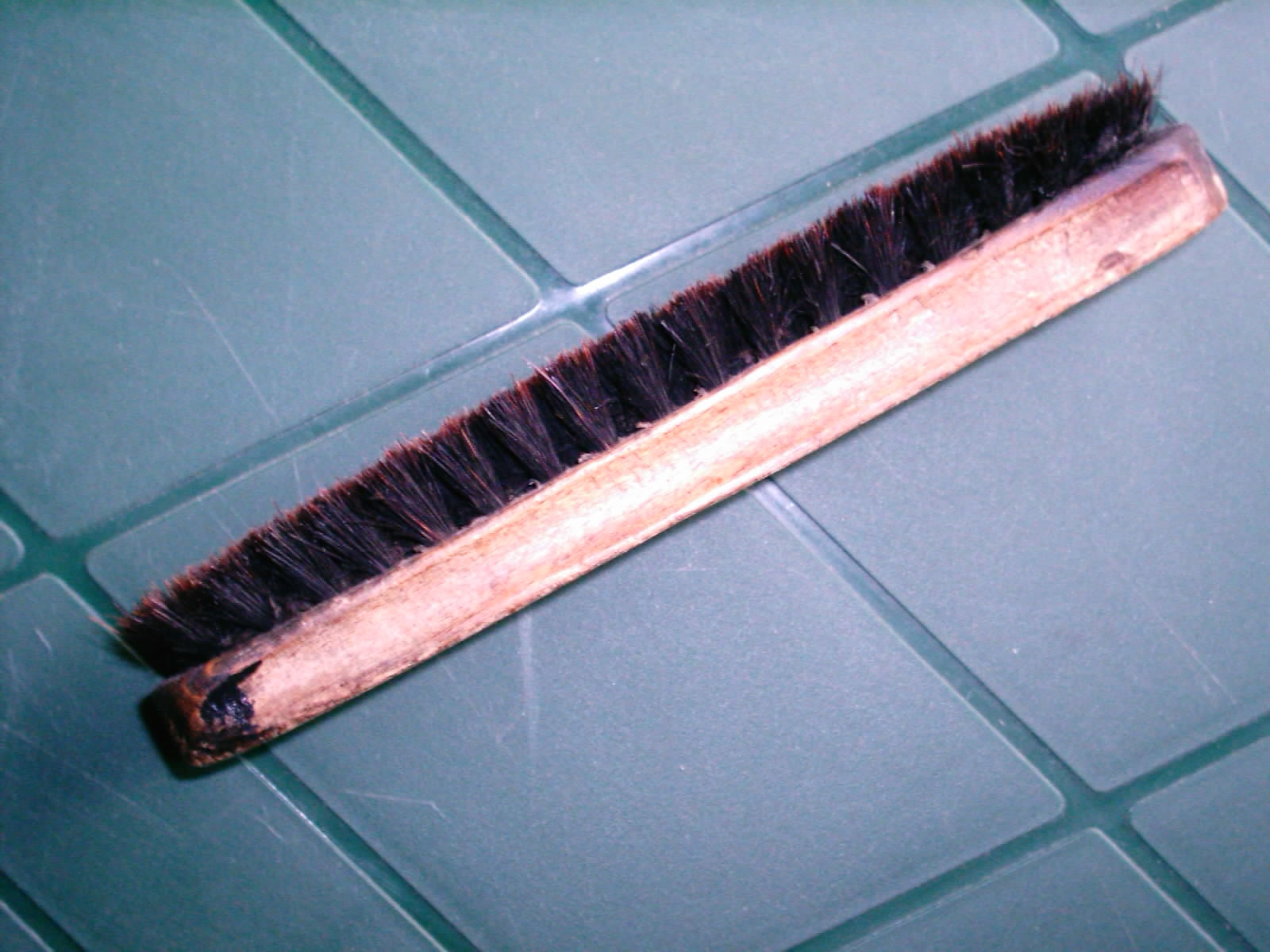 Драган Цветковић Ниш, четка за ципеле